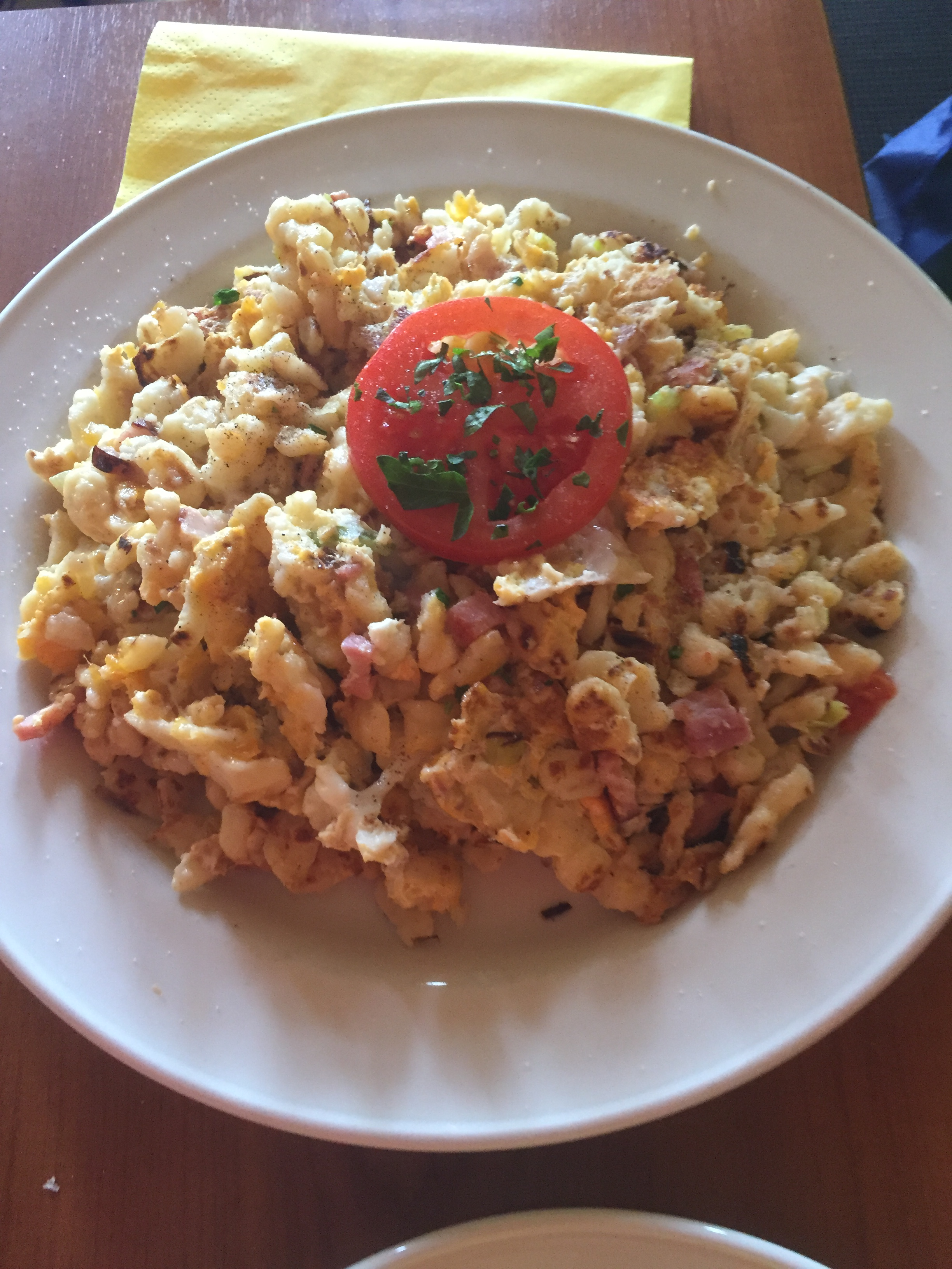 Eiernockerl mit Speck im Cafe Falk, Wagramer Straße.